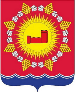 герб Судака